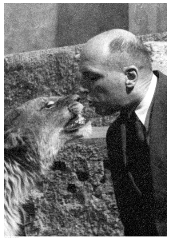 Фотография на Ян Жабински, полски зоолог, физиолог и животновъд.